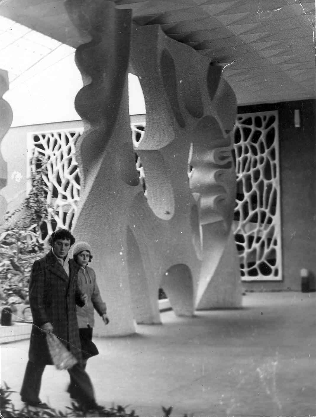 Панно «Весна». Дом природы, г. Кривой Рог, 1981 год.